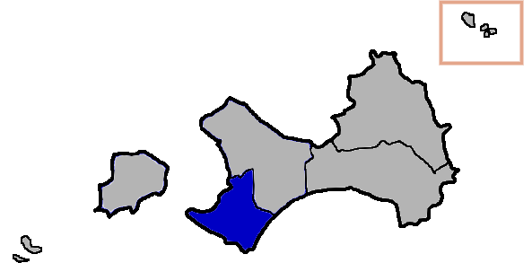 KaurJmeb為編寫福建省金門縣金城鎮，於2005年2月7日所繪。